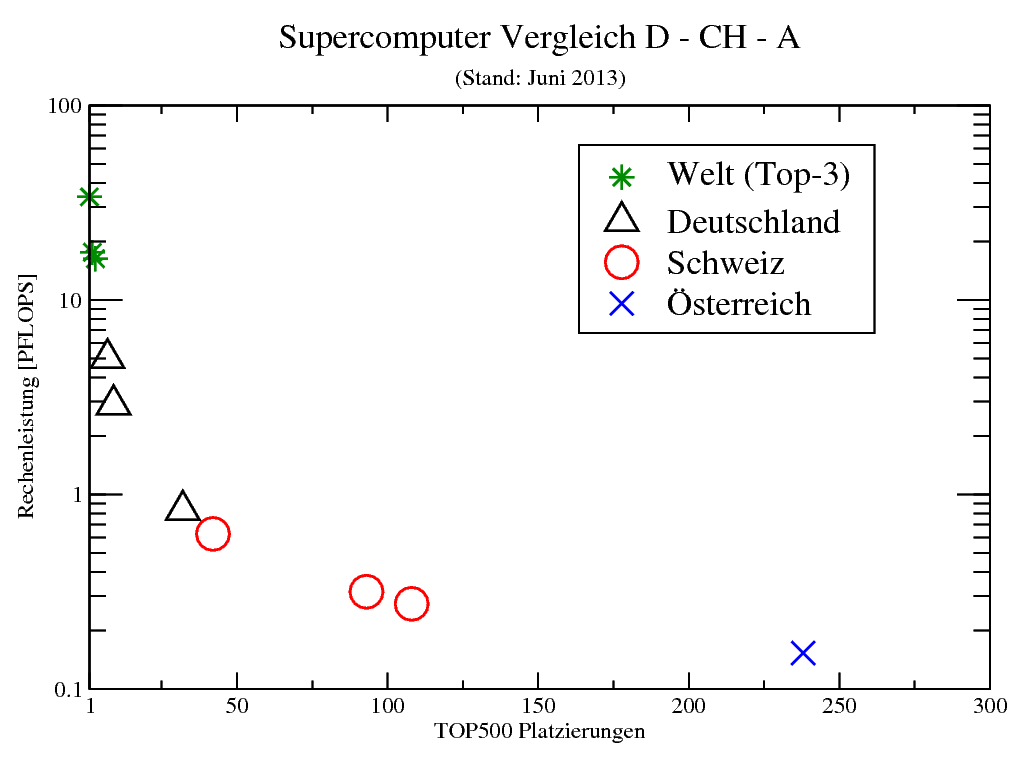 TOP500 Supercomputer-Platzierungen nach Ländern (Deutschland, Schweiz, Österreich) im Leistungsvergleich zu TOP3. (Stand Juni 2013)